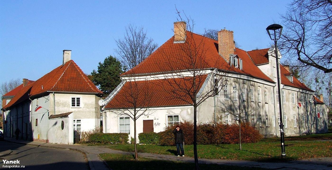 Dawny Spendhaus przy ul. Sierocej.